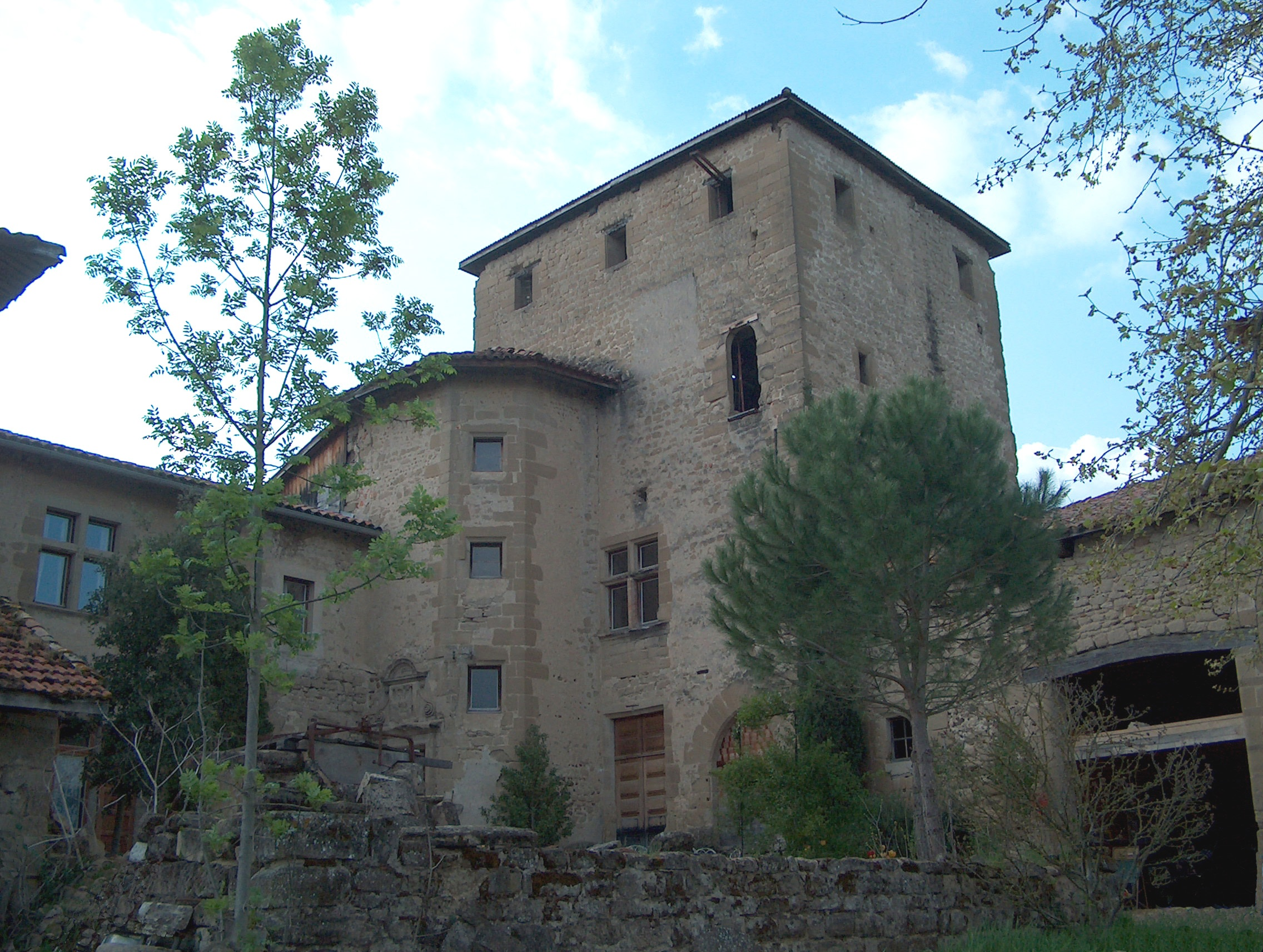 Maison-Forte du Chatelard à St Bonnet de Chavagne (Isère) Photo prise par Daniel Etienne